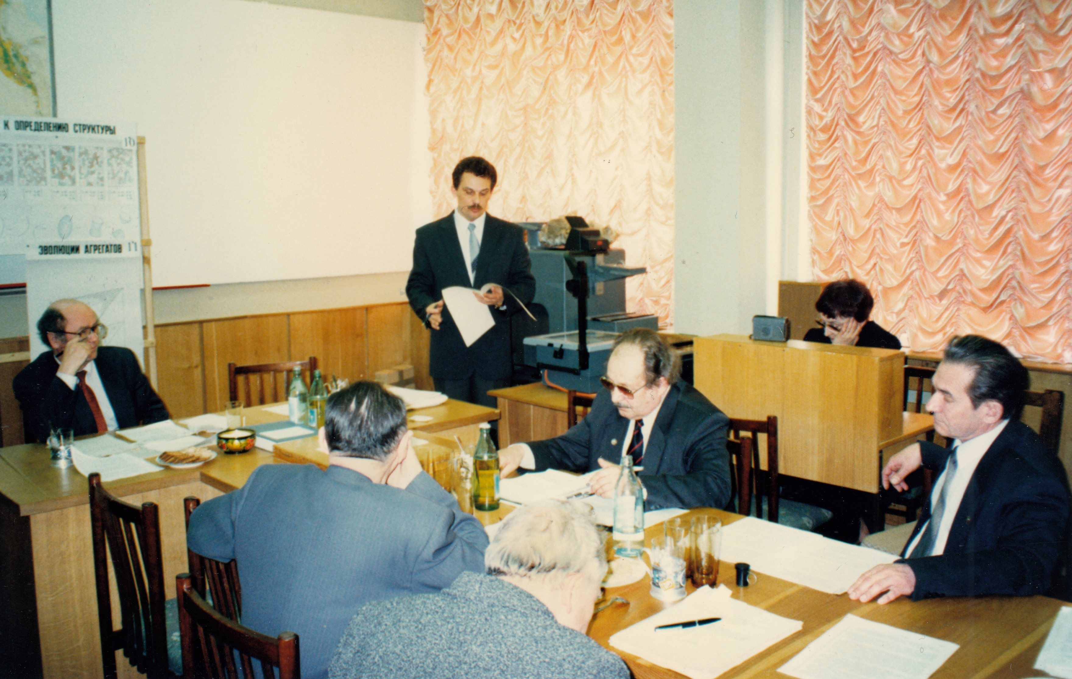 Войтеховский Ю.Л. защита докторской